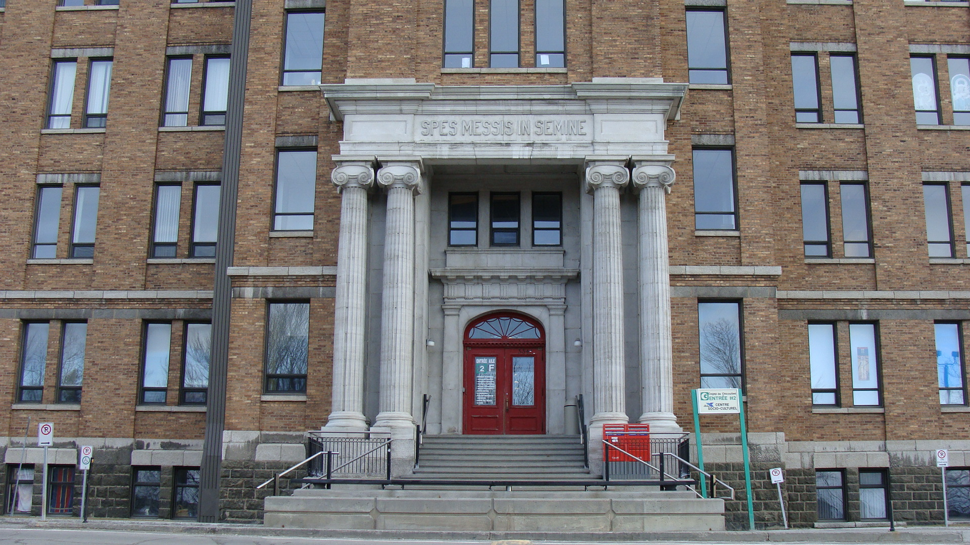 Entrée de l'ancien Séminaire de Chicoutimi (actuel Cégep de Chicoutimi), au Québec (Canada).